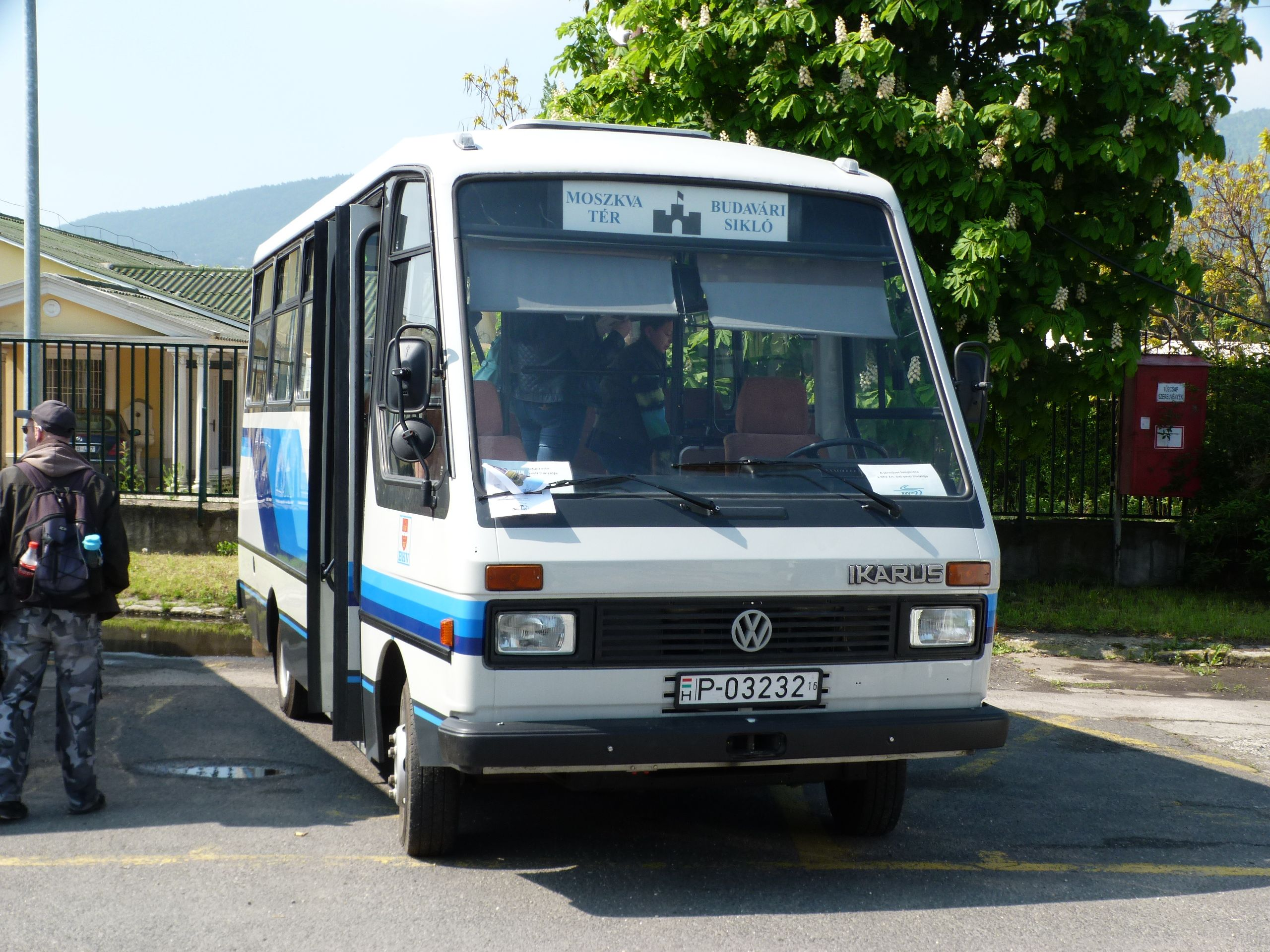 Ikarus 521 Óbudán